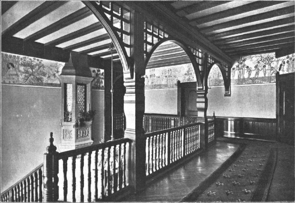 Diele in der Villa Knorr, Heilbronn. Architekten: J. Vollmer & H. Jassoy, Berlin